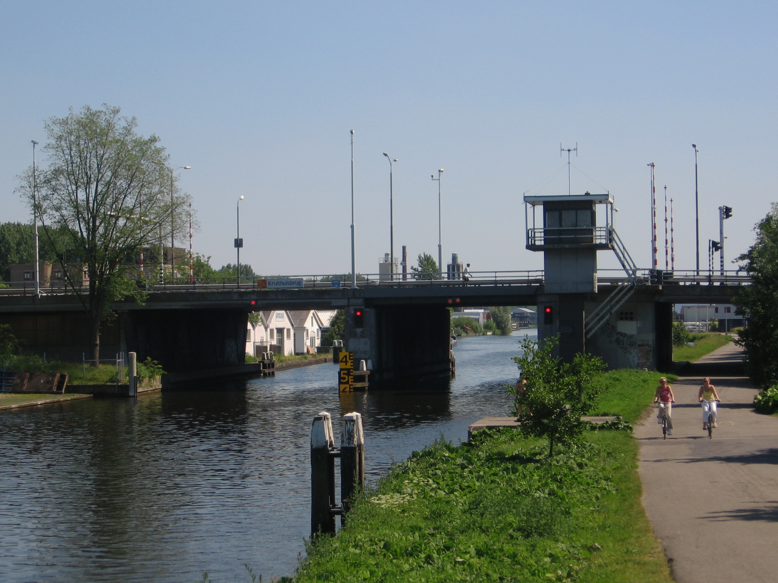 Bridges in Delft, 11 juni